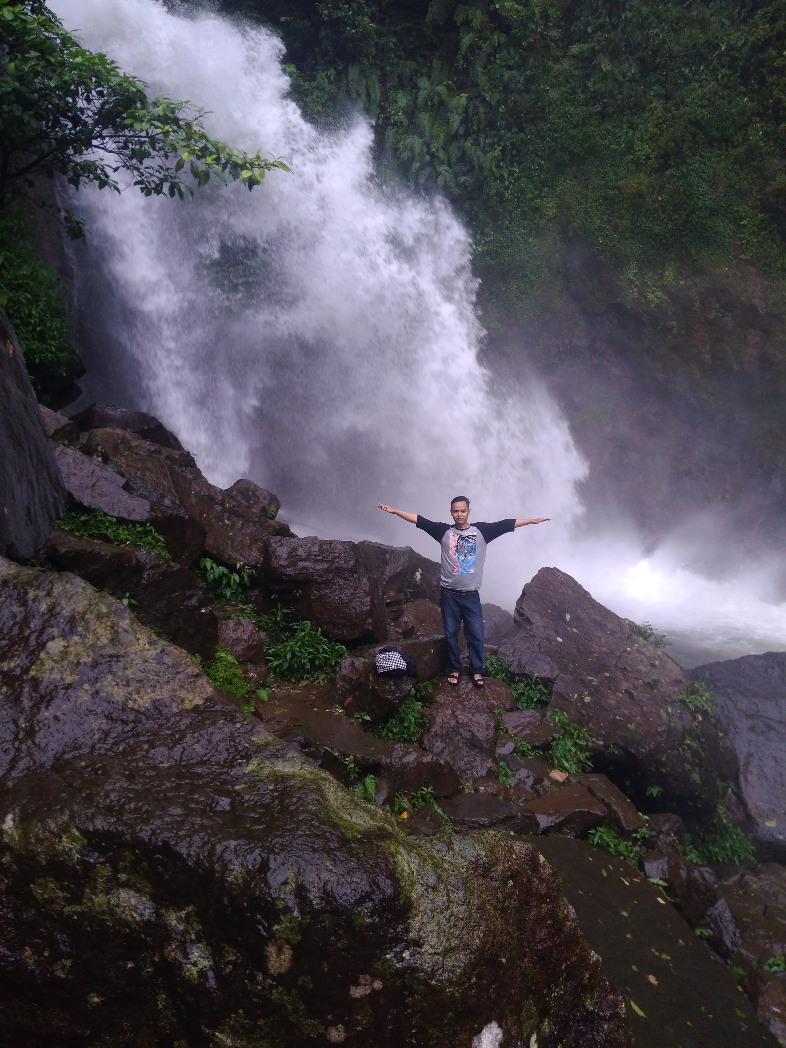 Curug Ciherang Bogor Original upload from